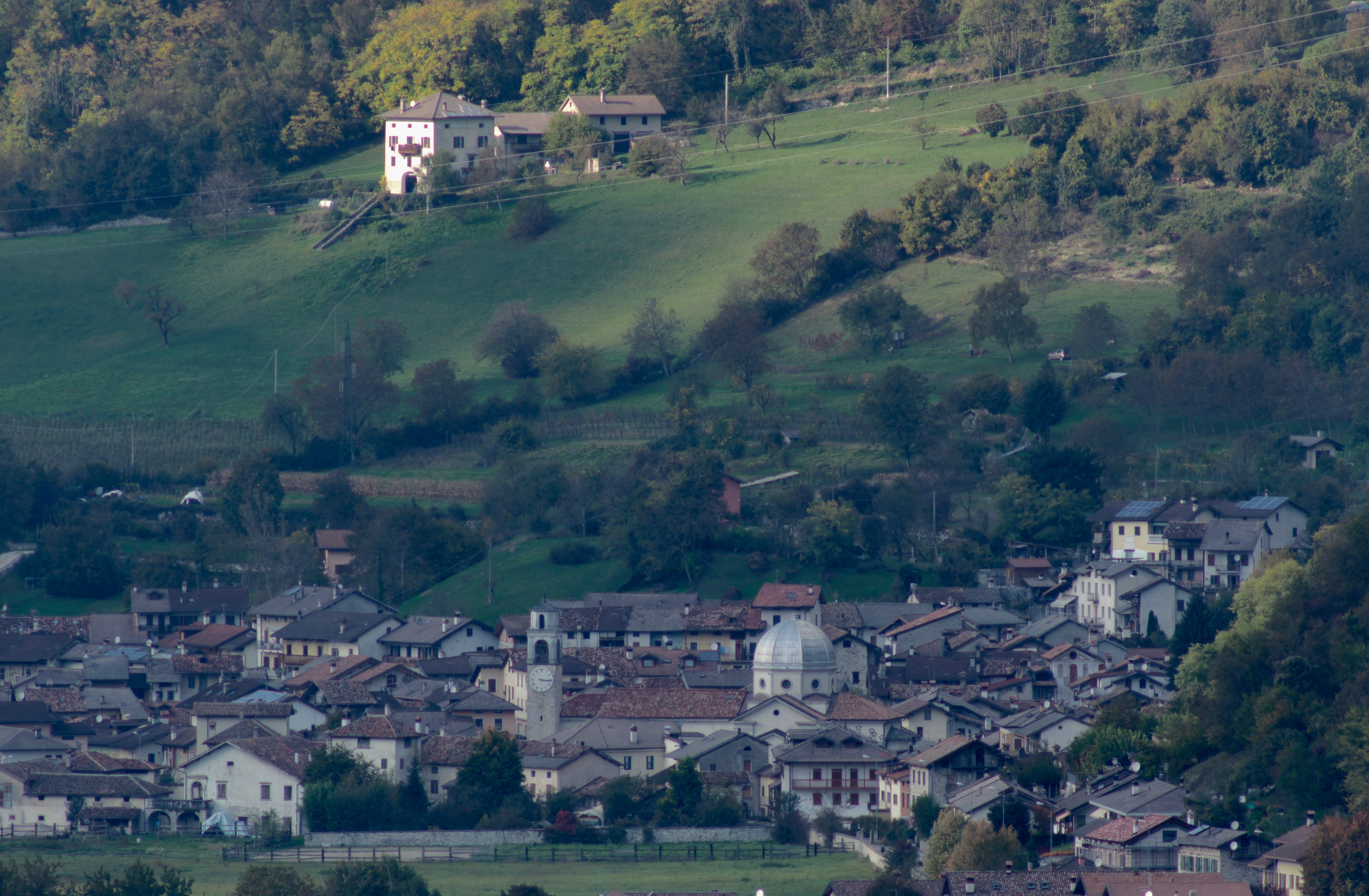 Il centro di Arten, visto da Seren del Grappa. Si noti la chiesa e parte della Villa Tonello.